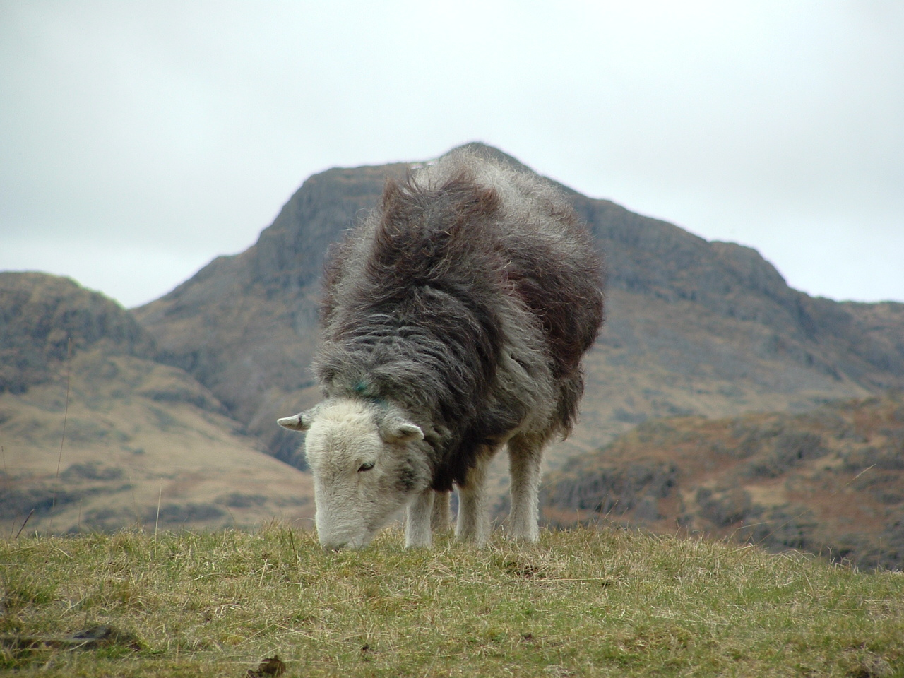 Herdwick sheep in the lake district